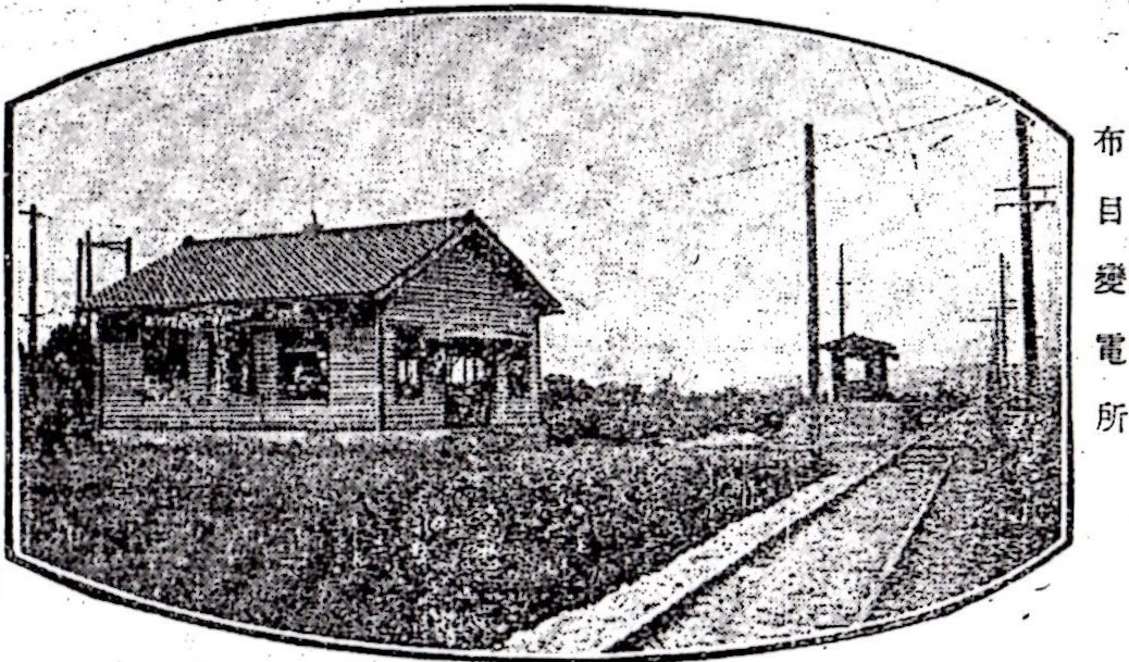 開業当初の布目停留場と布目変電所